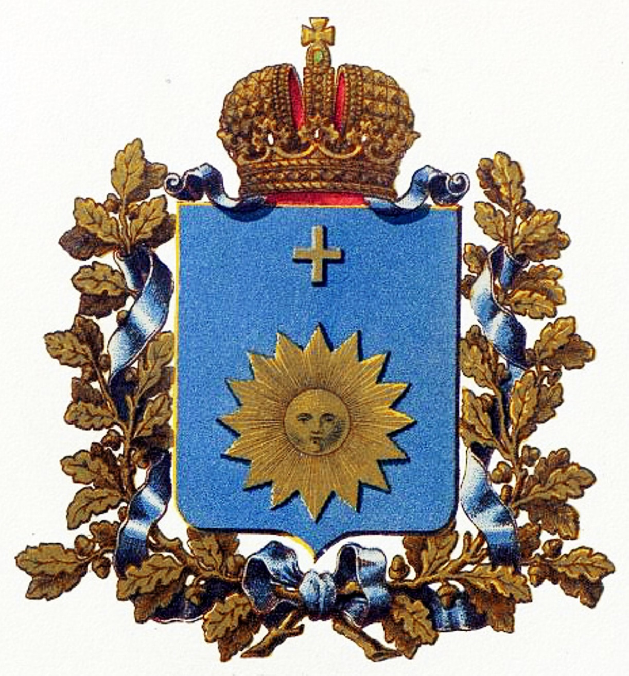 Official Russian Empire coat of arms Podolia Governorate. Герб Российской Империи Подольской губернии в Гербовнике МВД. Утверждён Императором Всероссийским Александром Вторым в 1878 году.